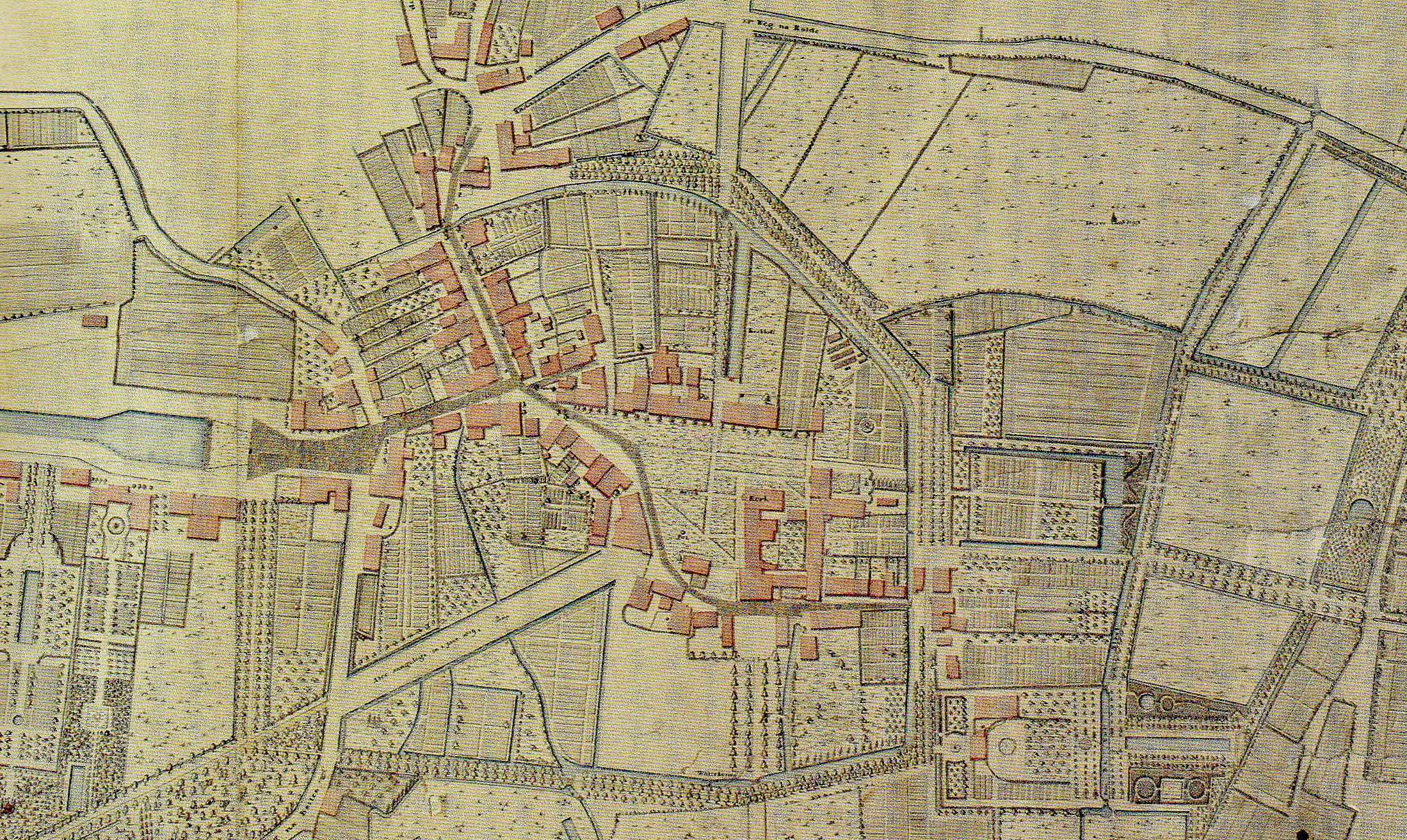 Detail van de Plattegrond van de stad Assen met deszelfs omgeleegende tuinen, landen en bosschen. Opgenomen en vervaardigd op order van het Departementaal bestuur en ten dienste van den architect Giudici, door zyne Majesteit den Koning belast, met het maken van een Plan, waana de gedachte Stad verder zoude behoren te worden getimmerd" uit 1809. Getekend door Pieter Adriaan Cornelis Buwama Aardenburg (overleden 1815).